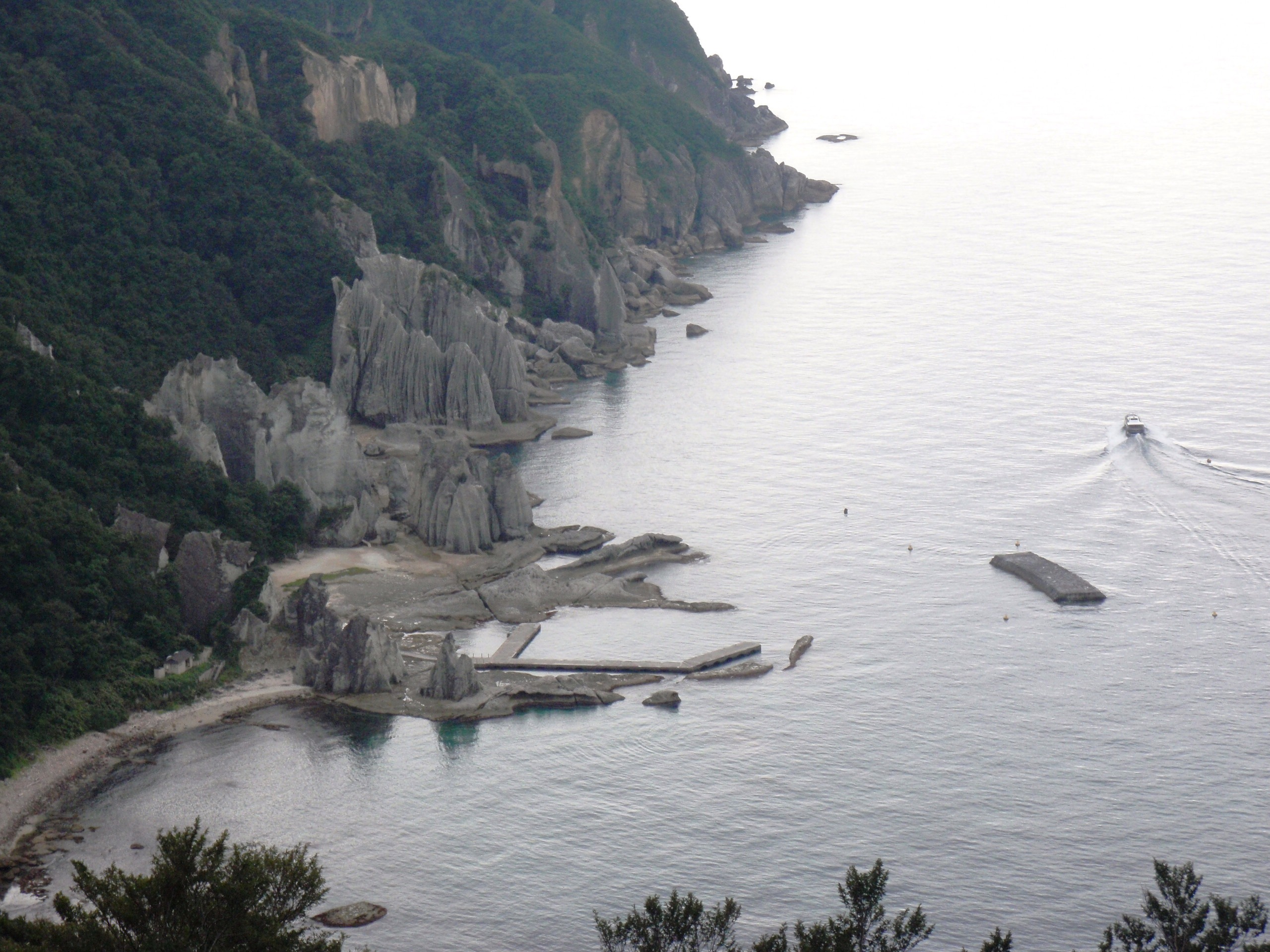 国道338号から見る仏ヶ浦